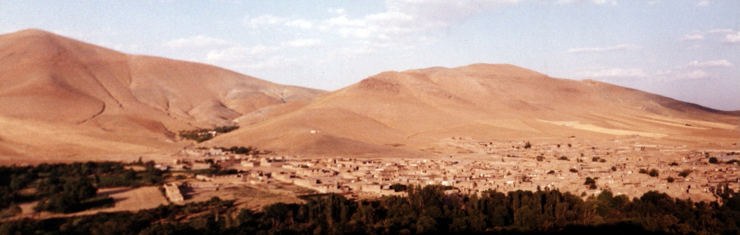 تۆرکجه: آجین شهری اسدآباد بولگه سینین یئنی شهری پانوراما شکیلی